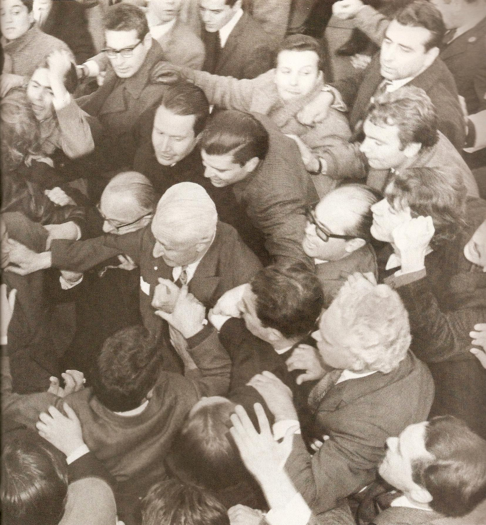 El presidente de Argentina, el radical Arturo Illia, abandona la Casa de Gobierno en medio de una muchedumbre tras ser destituído por un golpe de Estado militar encabezado por el Jefe de las Fuerzas Armadas, general Juan Carlos Onganía.